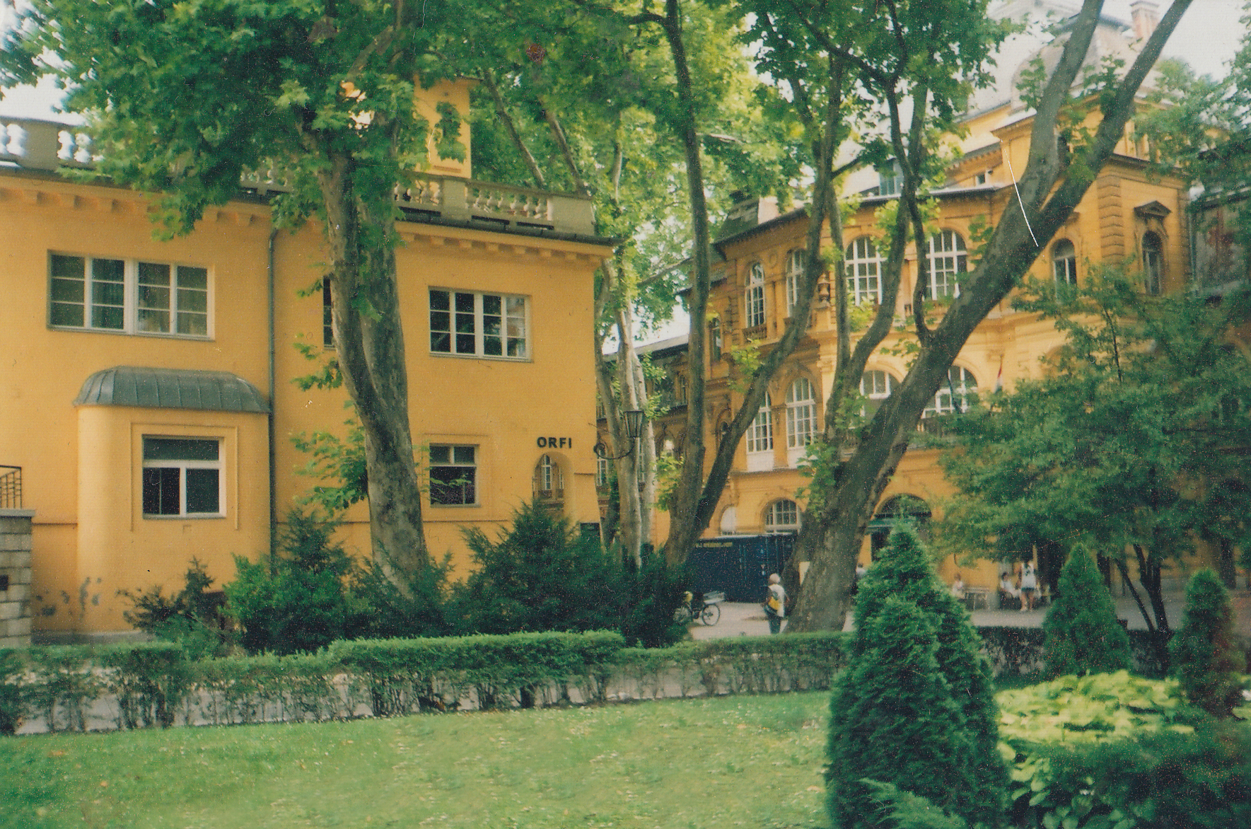 Budapest, Lukács fürdő